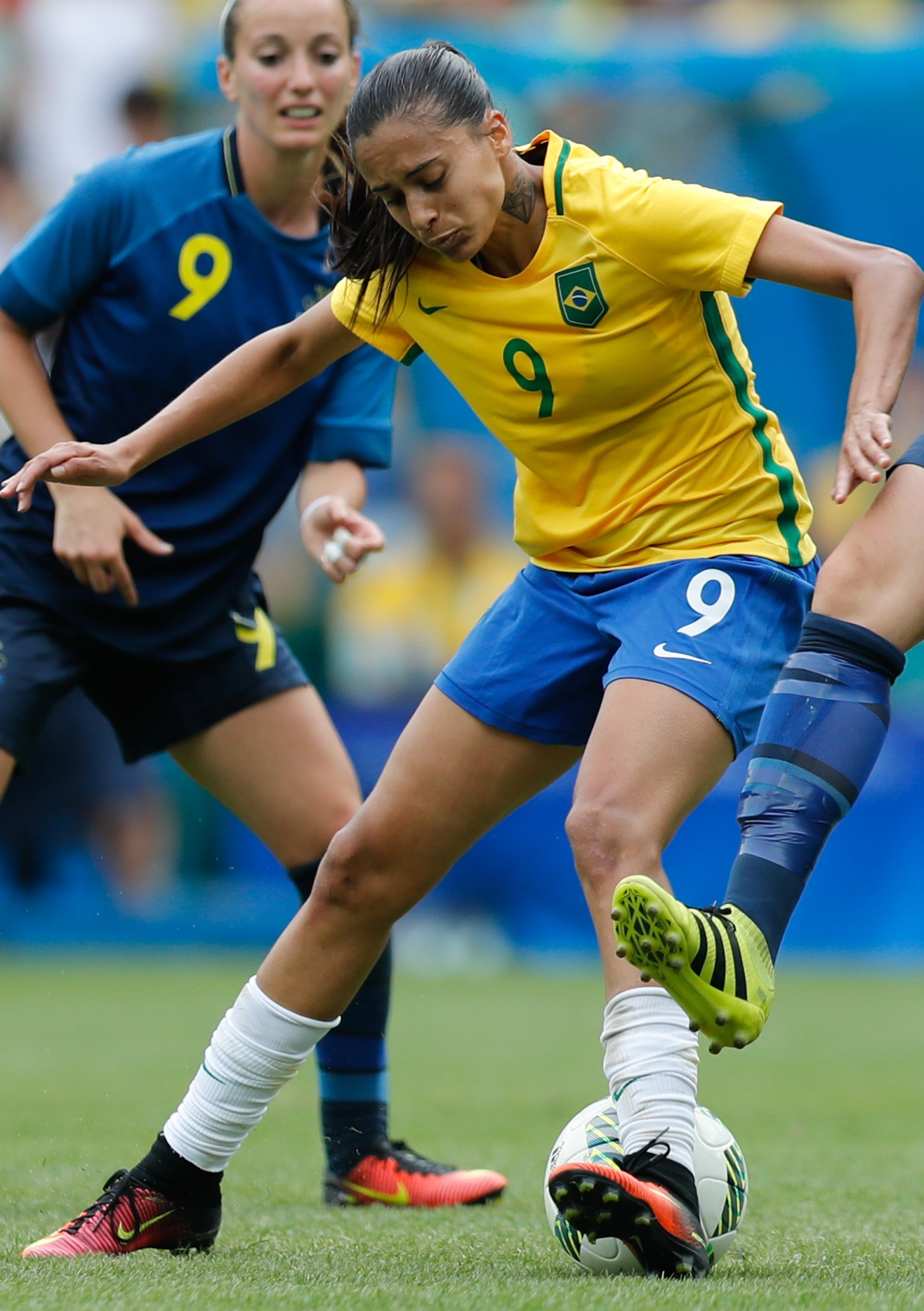 Rio de Janeiro - Seleção brasileira de futebol feminino disputa semifinal com a Suécia, no Maracanã. O Brasil perde nos pênaltis e vai disputar o bronze (Fernando Frazão/Agência Brasil)